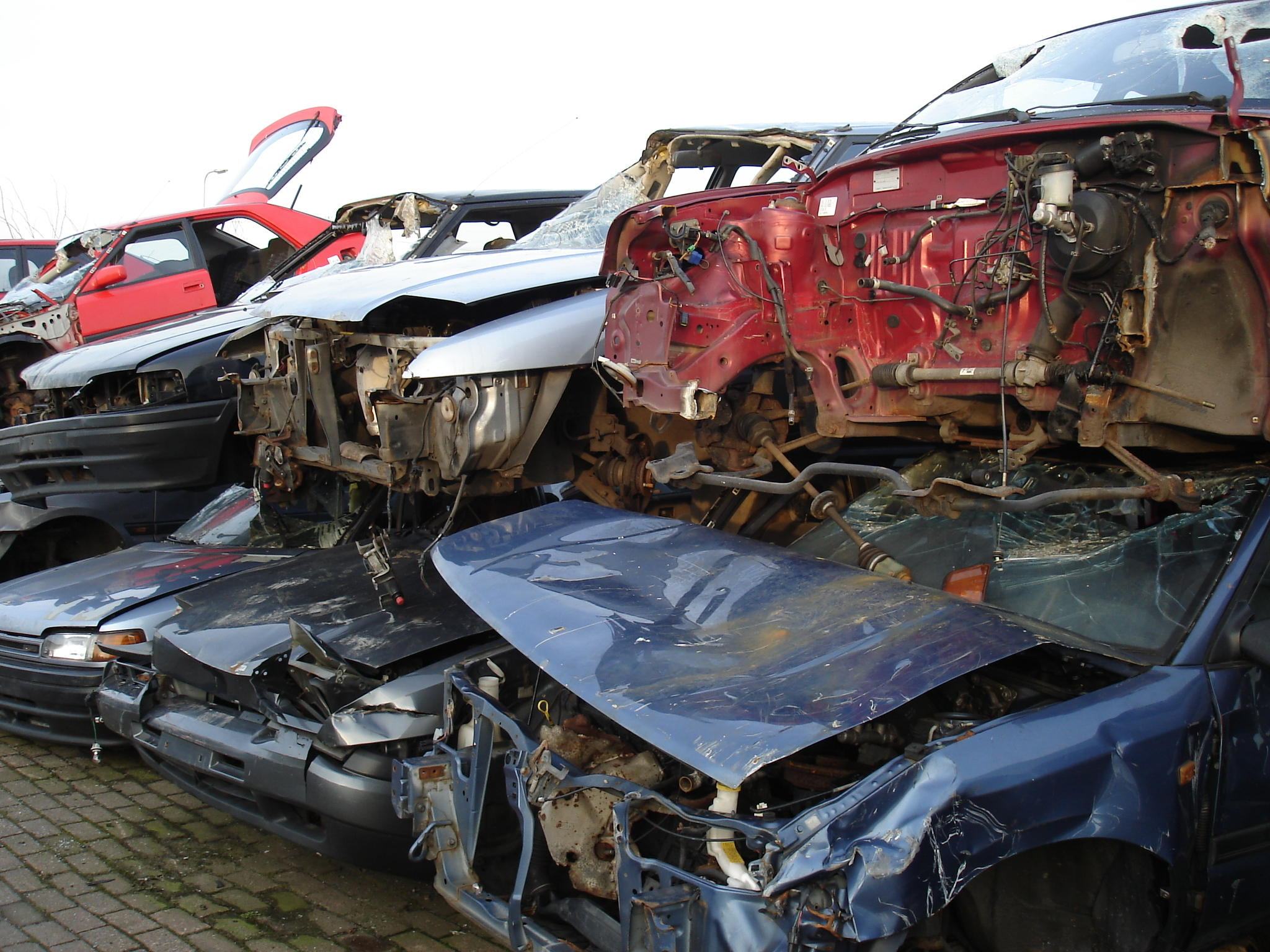 Sloopauto's bij Autodemontagebedrijf De Mars op bedrijventrerrein Marslanden in Zwolle.